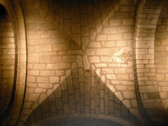 Bóveda de arista. San Isidoro de León.